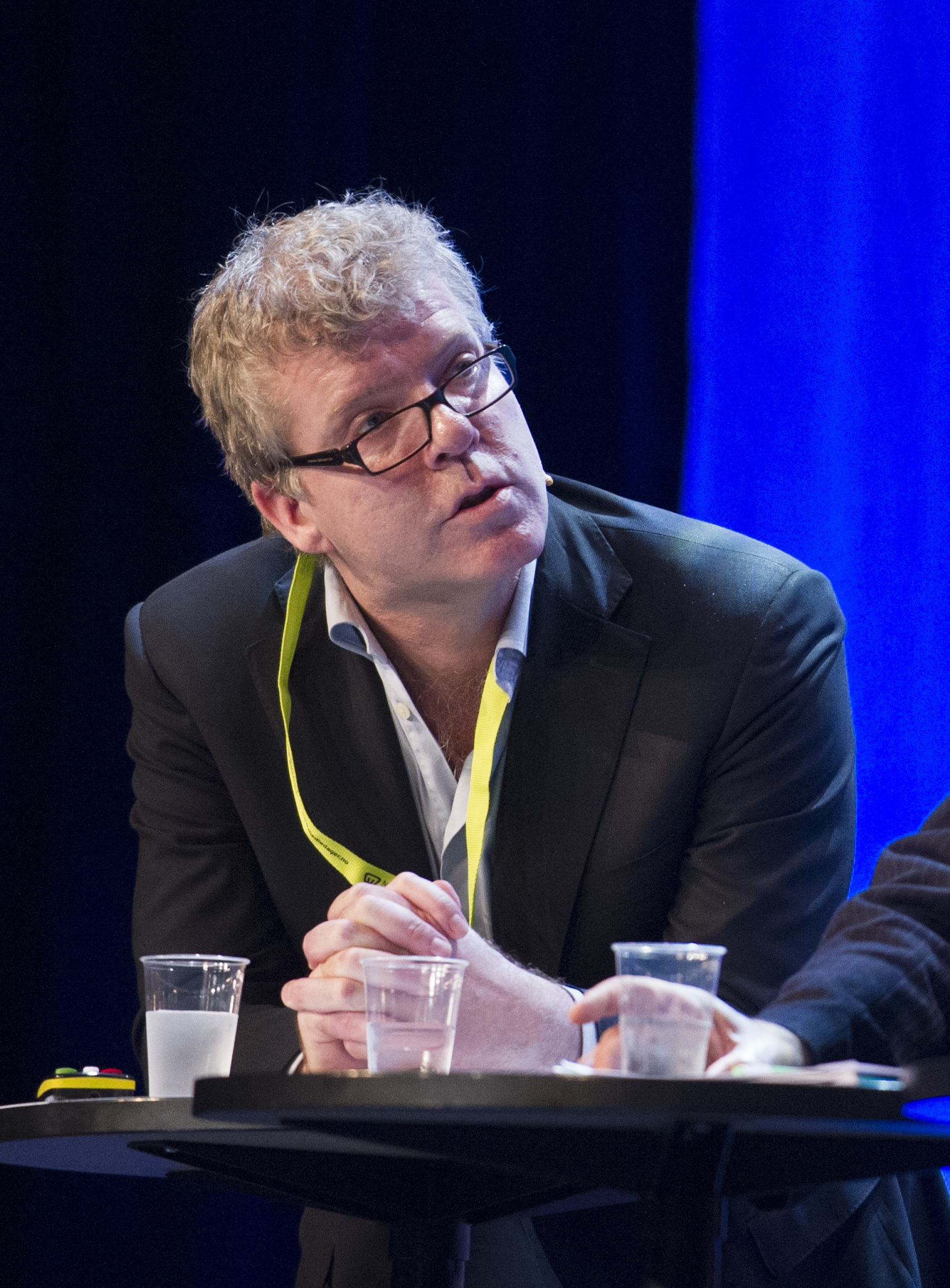 Medvirkende: Jens Garbo, Rita Helgesen, Jon Hustad, Shazia Sarwar, Håvard Tjora, Frank Aarebrot.Moderator: Arill Riise.